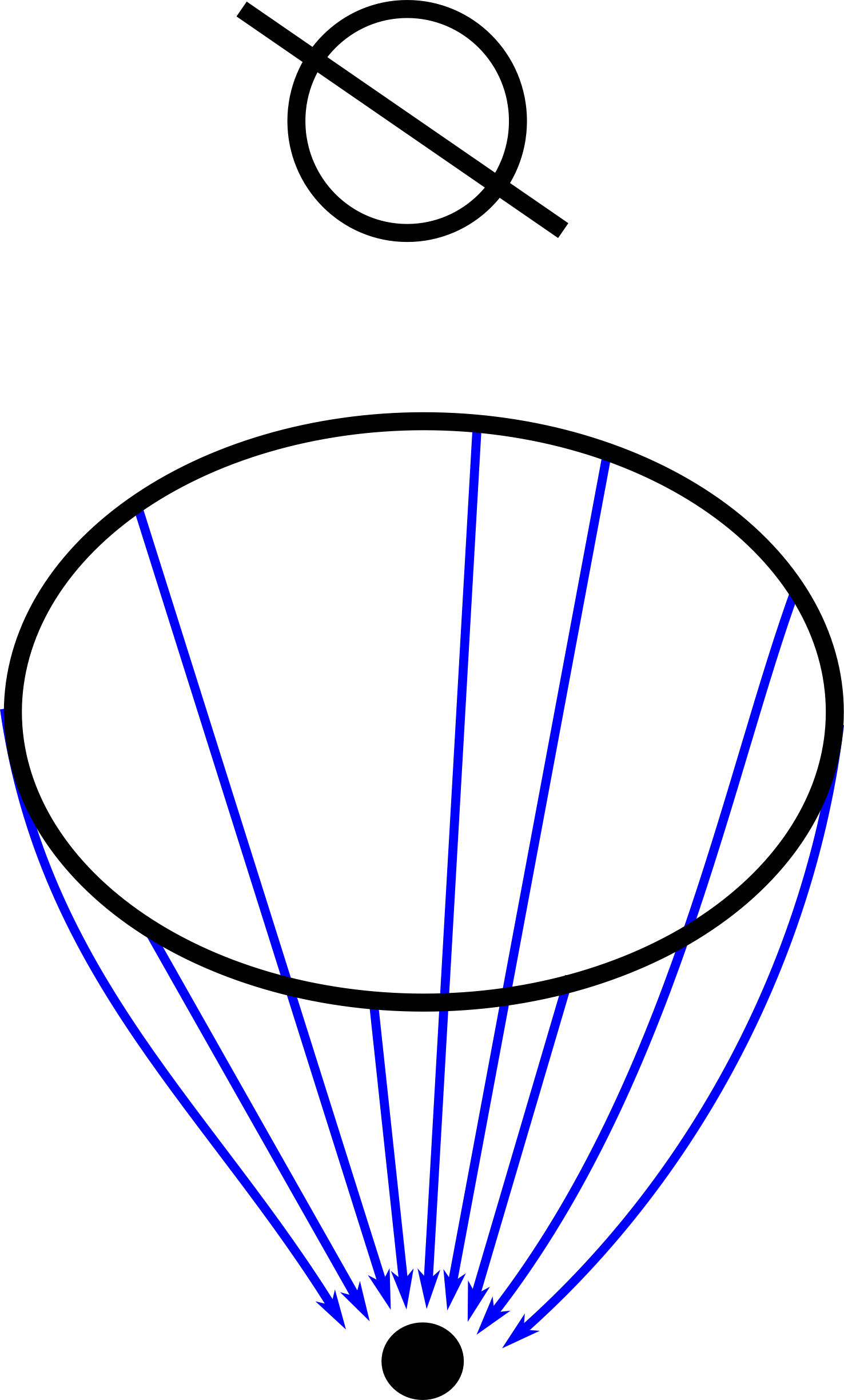 אוביקט תחילי ואוביקט סופי